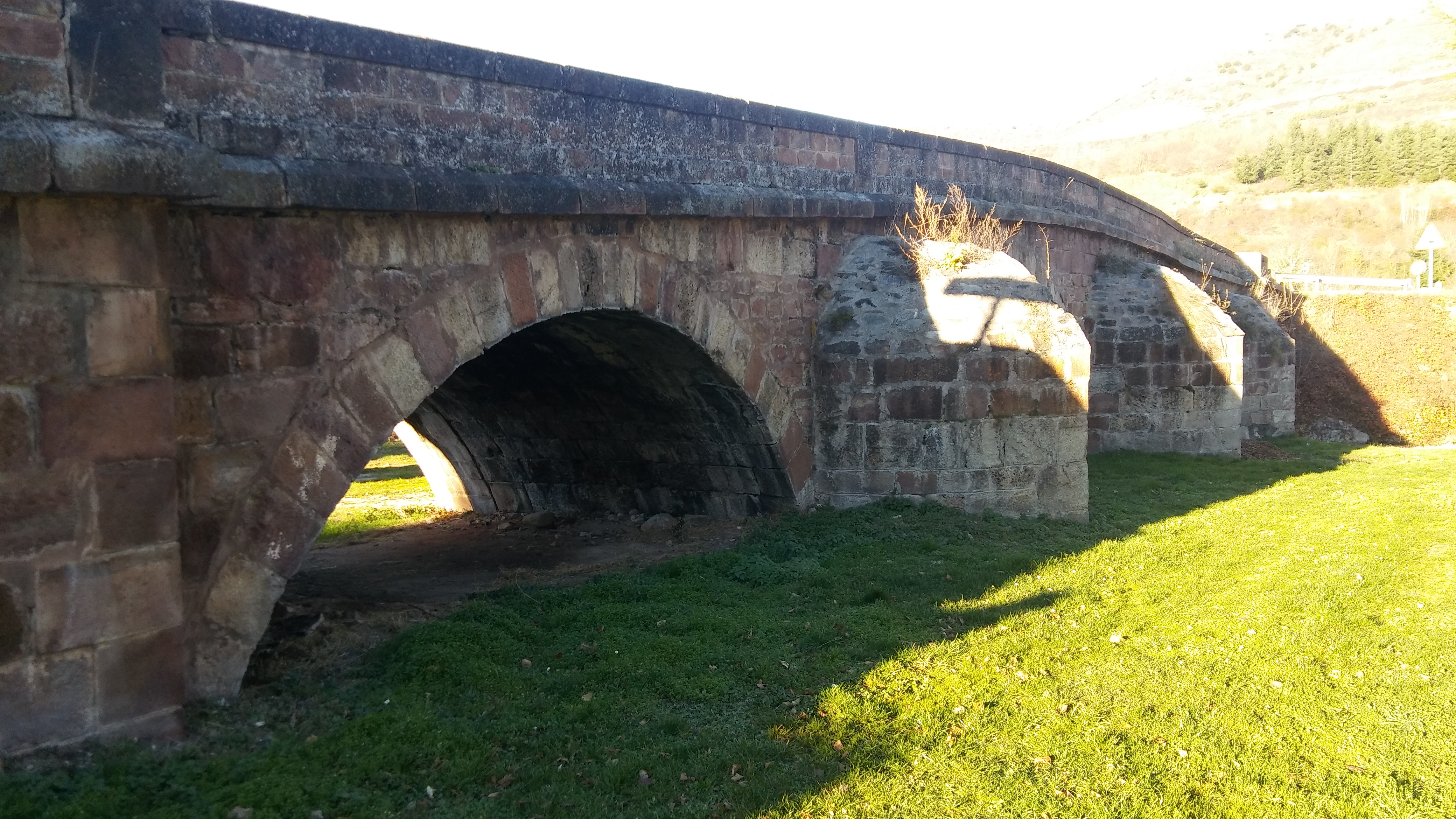 Vista desde la otra parte del puente de Fresneda de la Sierra